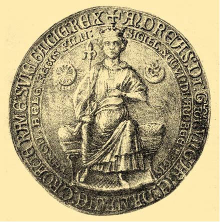 Ondřej II. pečeť